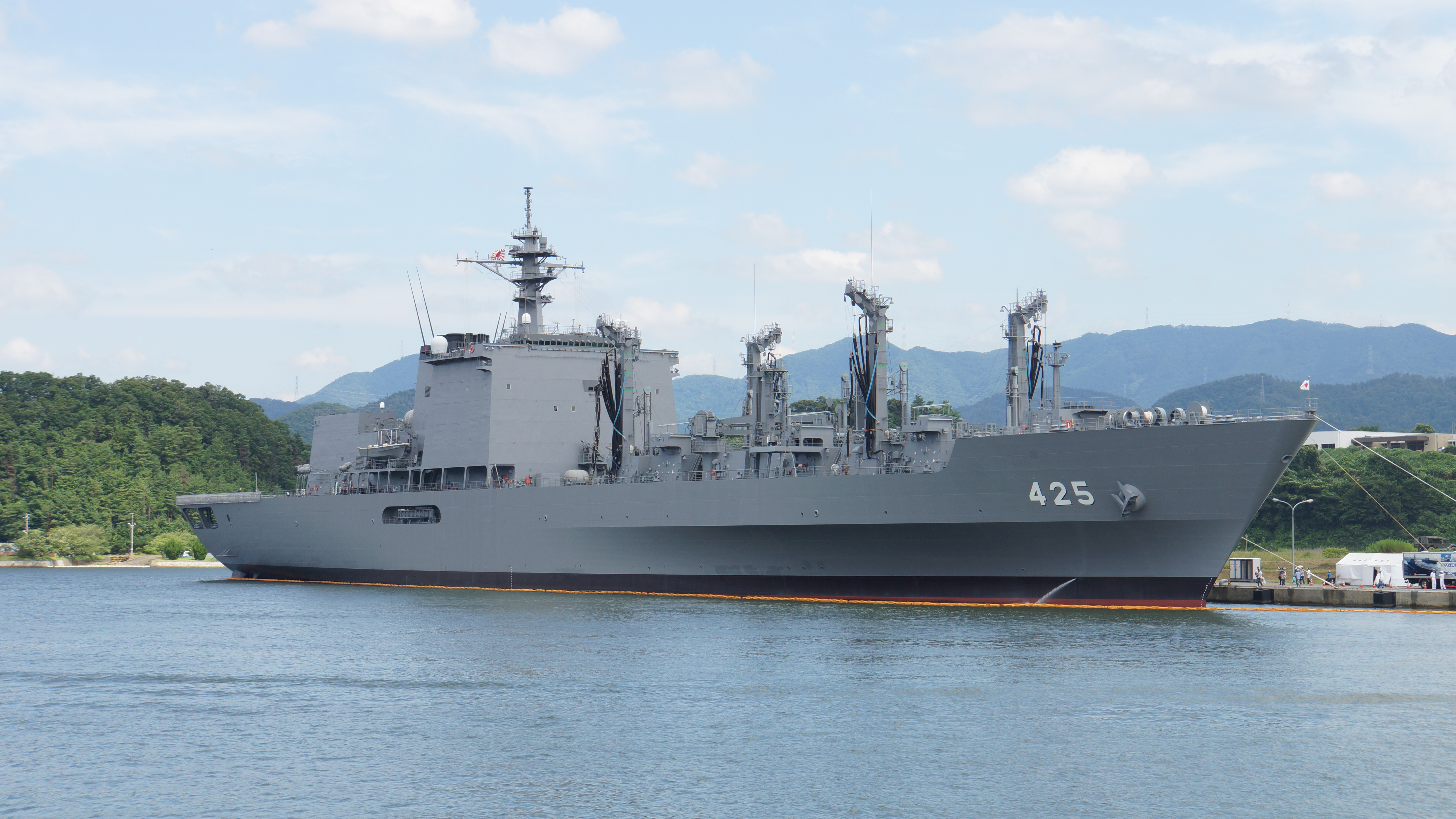 海上自衛隊 補給艦ましゅう（AOE-425）。2016年7月16日 舞鶴基地沖にて。